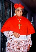 Cardenal Miguel Darío Miranda Gómez